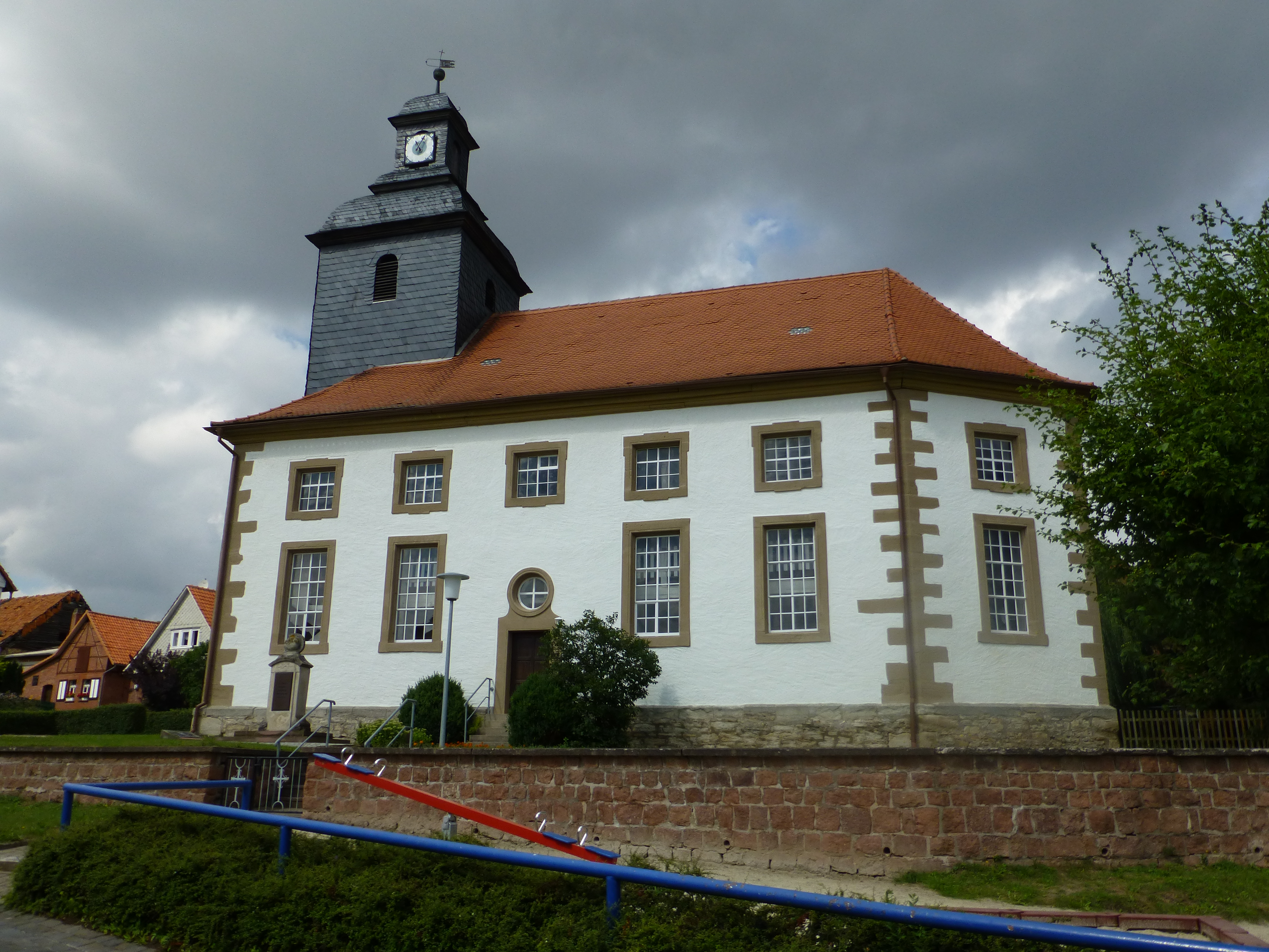 Die Kirche in Tastungen